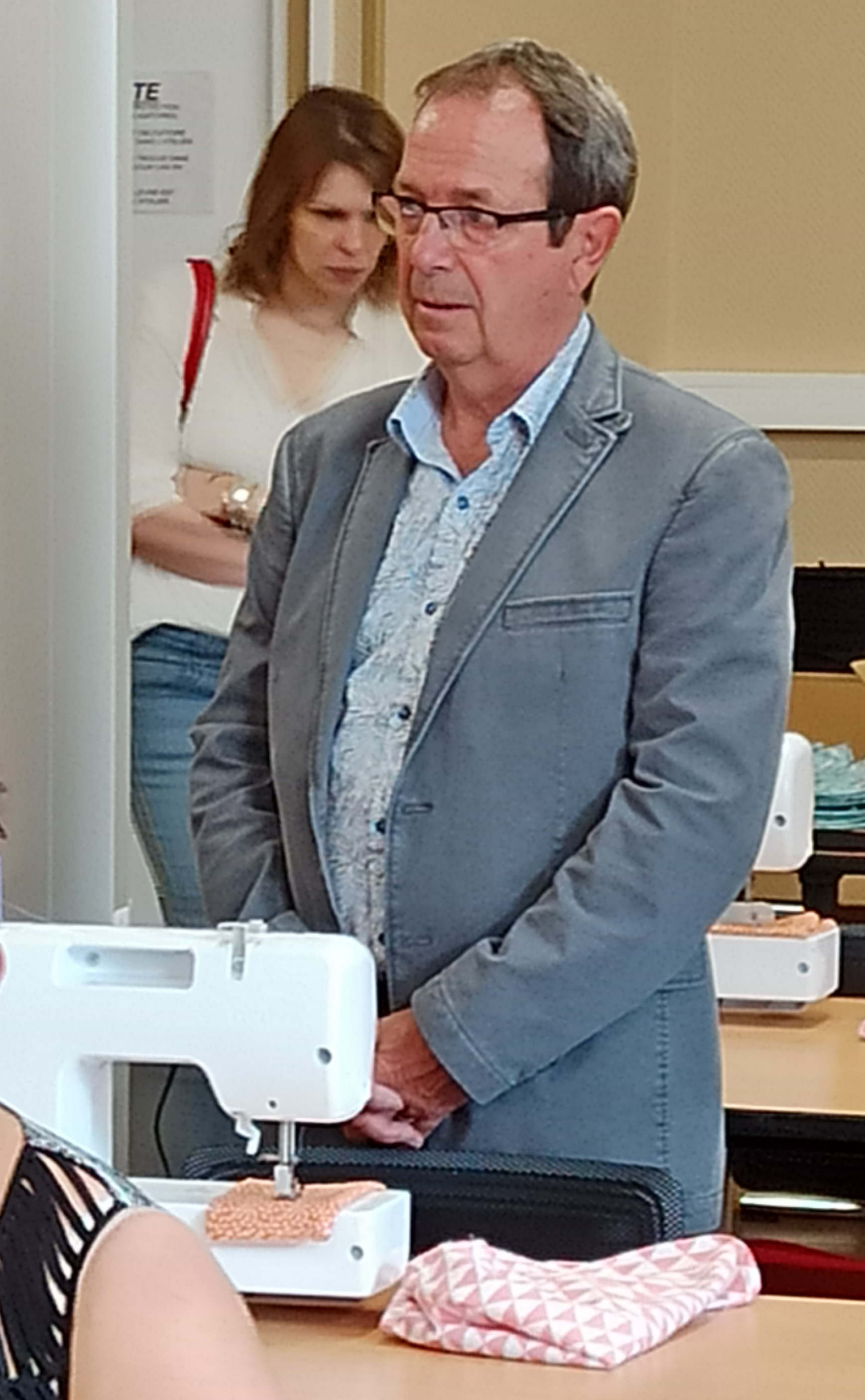 Jean-Michel Sieczkarek, maire de Wandignies-Hamage, lors de l'inauguration le 11 juillet 2020 par le sous-préfet de l'atelier couture au centre de formation de la CCCO à Auberchicourt